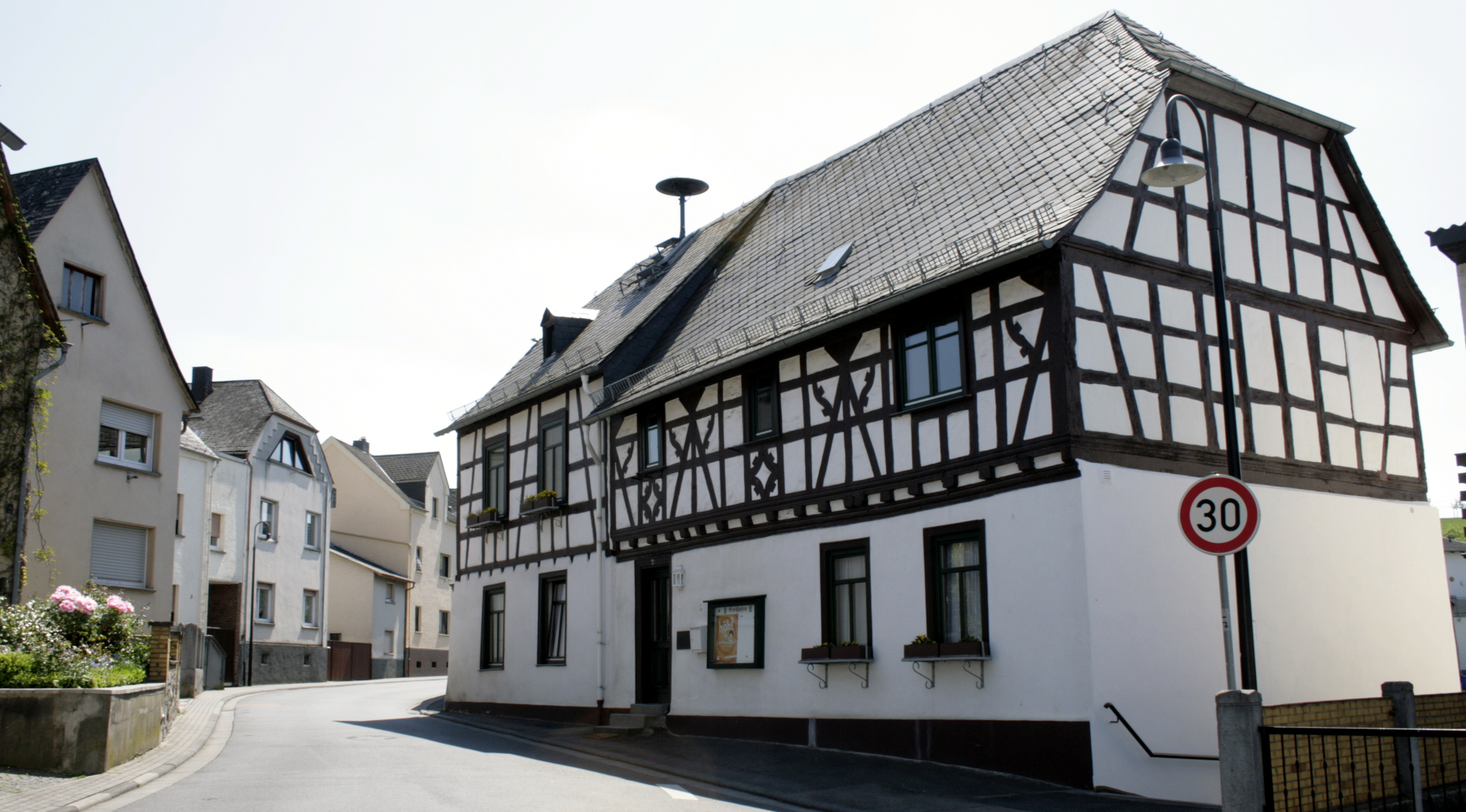 Ehemaliges Rathaus in Eschhofen, Deutschland